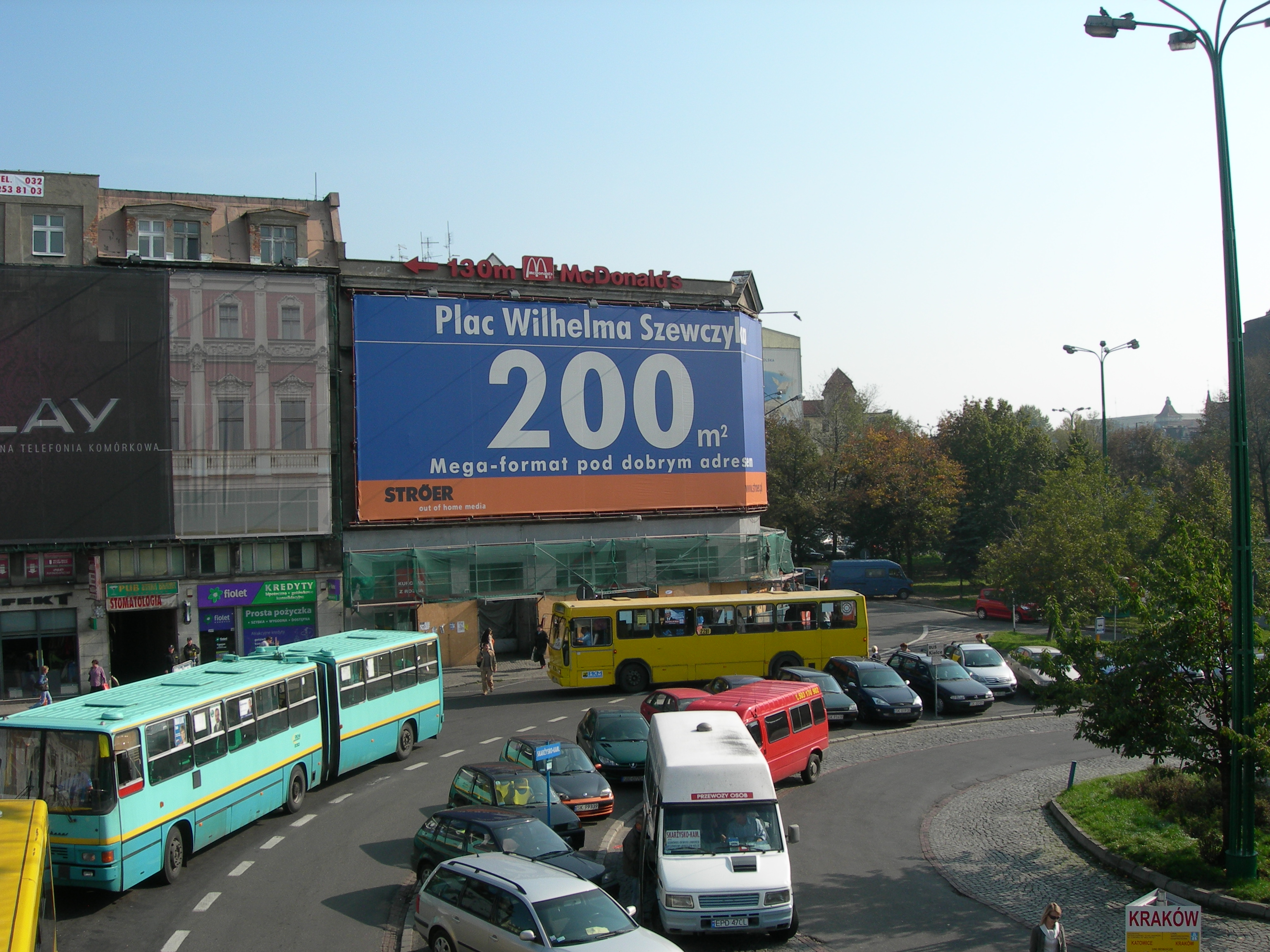 Plac Wilhelma Szewczyka w Katowicach.